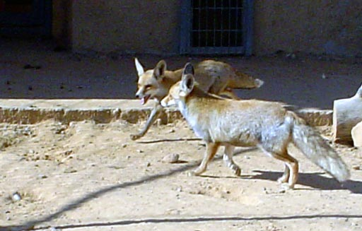 vulpes vulpes. pic taken by me at Revivim, Israel